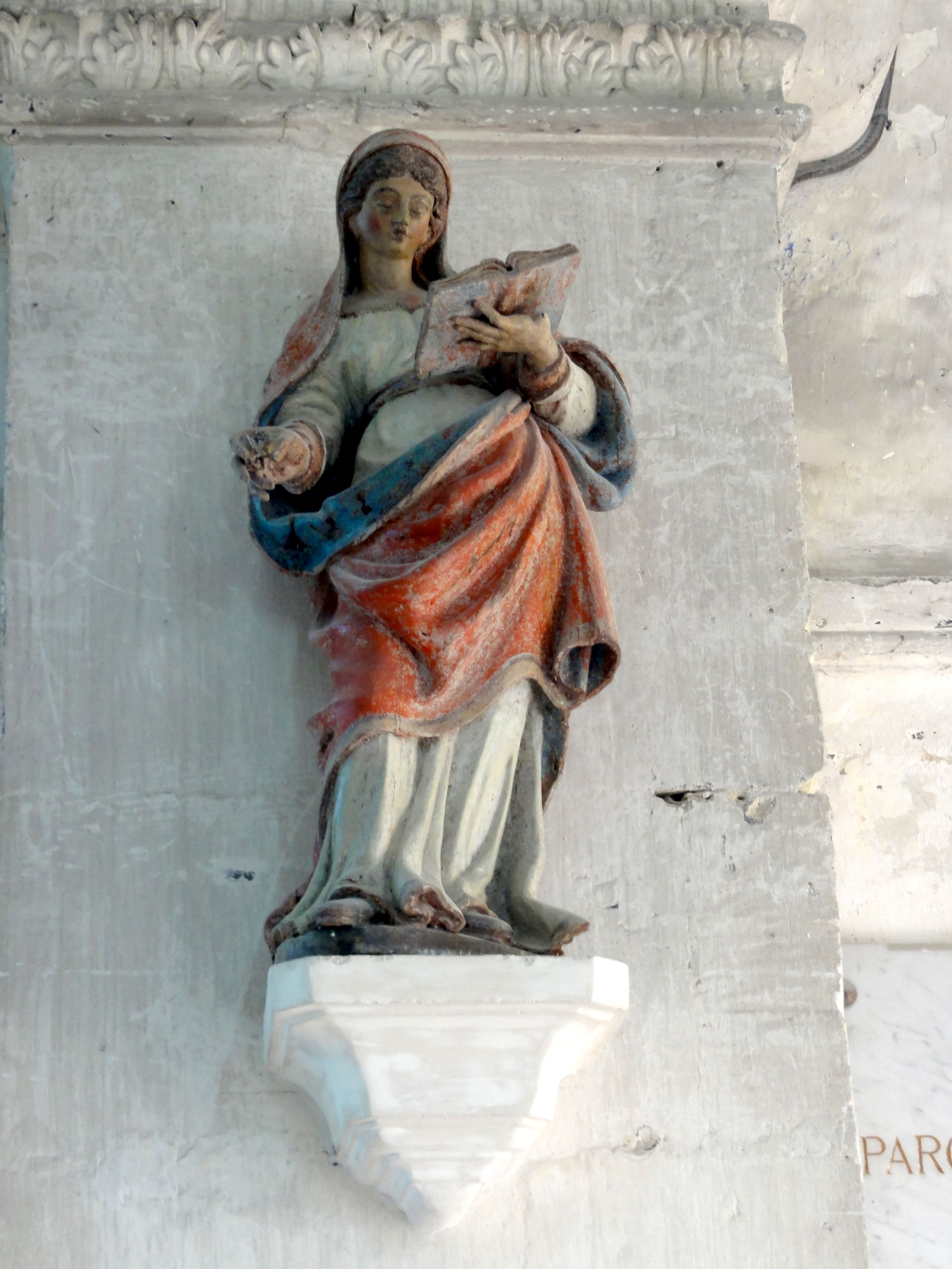 Statue (demi-nature) de sainte Geneviève de Paris.